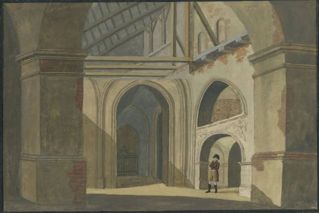 Poznań Collegiate by Alberti